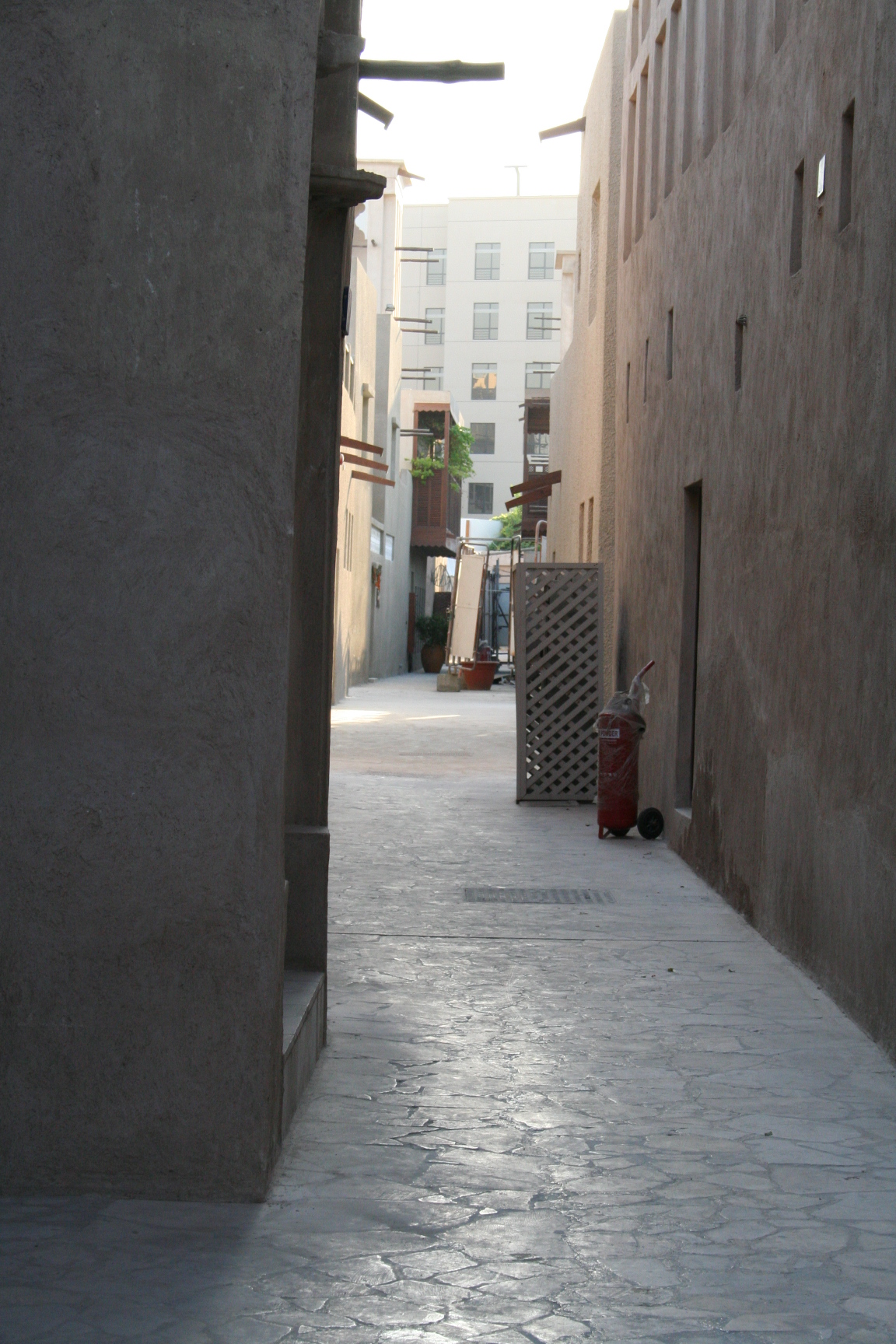 Al in Old district in Dubai